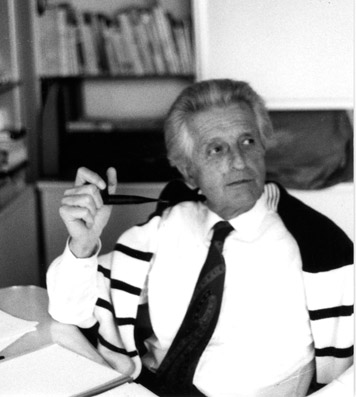 René BALLET at work